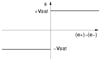 Caractéristique d'un ampli op